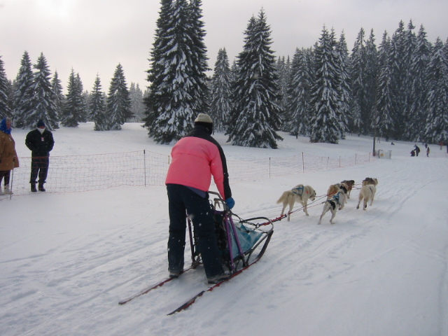 Course de Husky 2